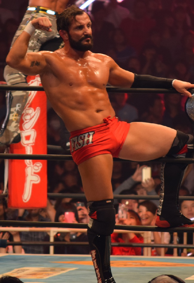 2015年11月7日 大阪府立体育会館 「POWER STRUGGLE」 ボビー・フィッシュ